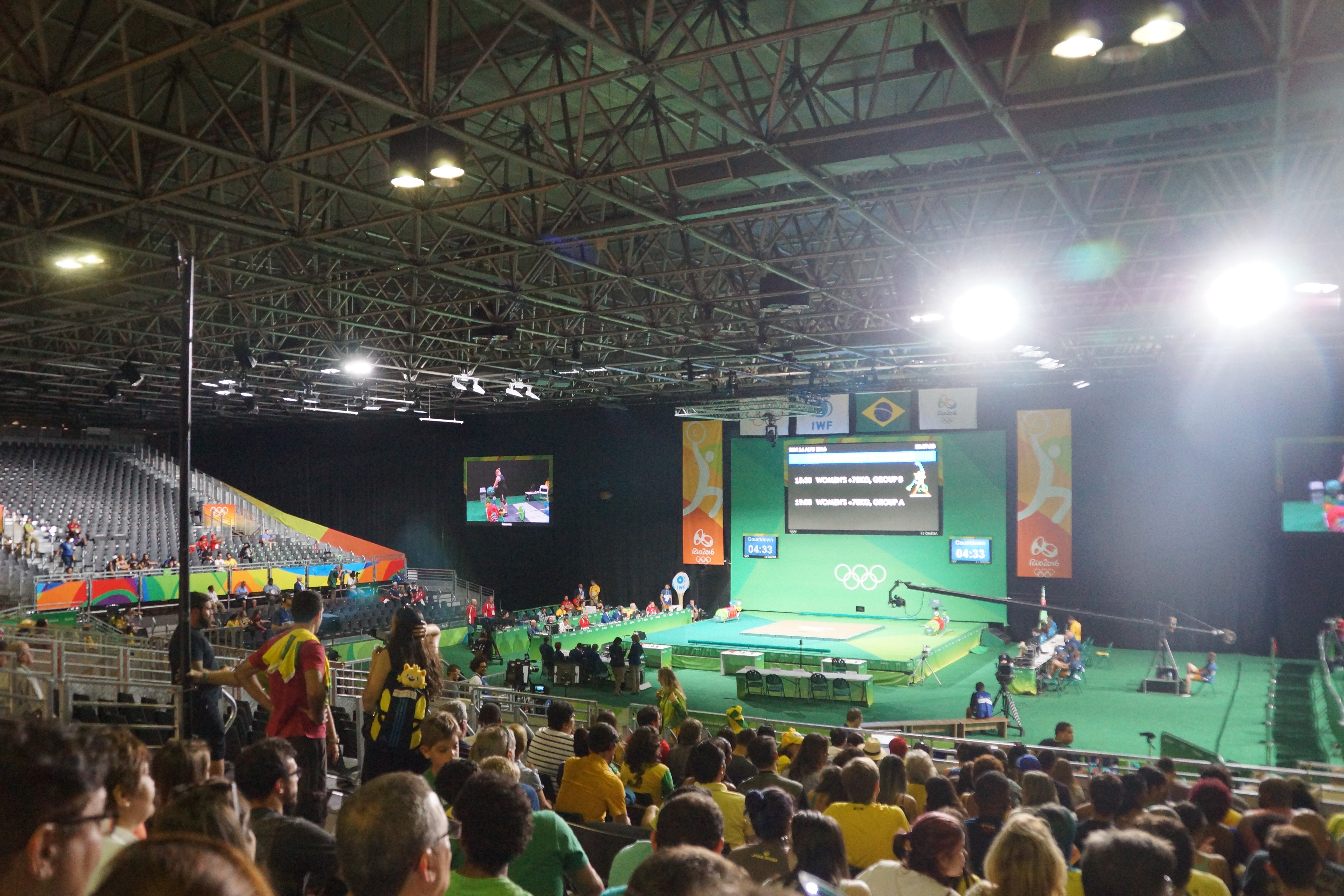 Rio 2016. Levantamento de pesos/ weight lifting